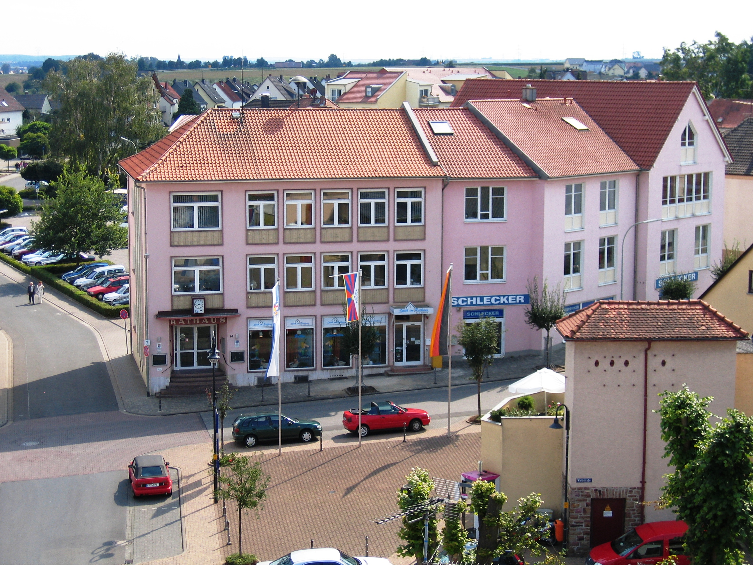 Rathaus von Wölfersheim (Blick vom Weißen Turm aus)